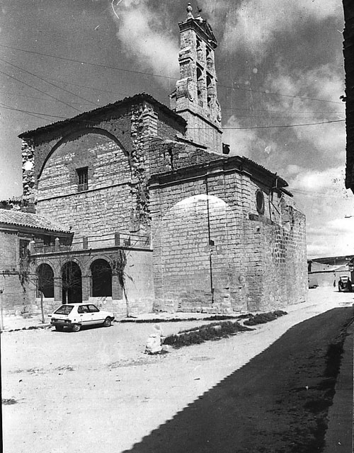 Iglesia de San Martín - Gallegos de Hornija (Valladolid) - Iglesia del siglo XVI con espadaña del XVIII. - Fotografía. Papel 83 x 103 B/N